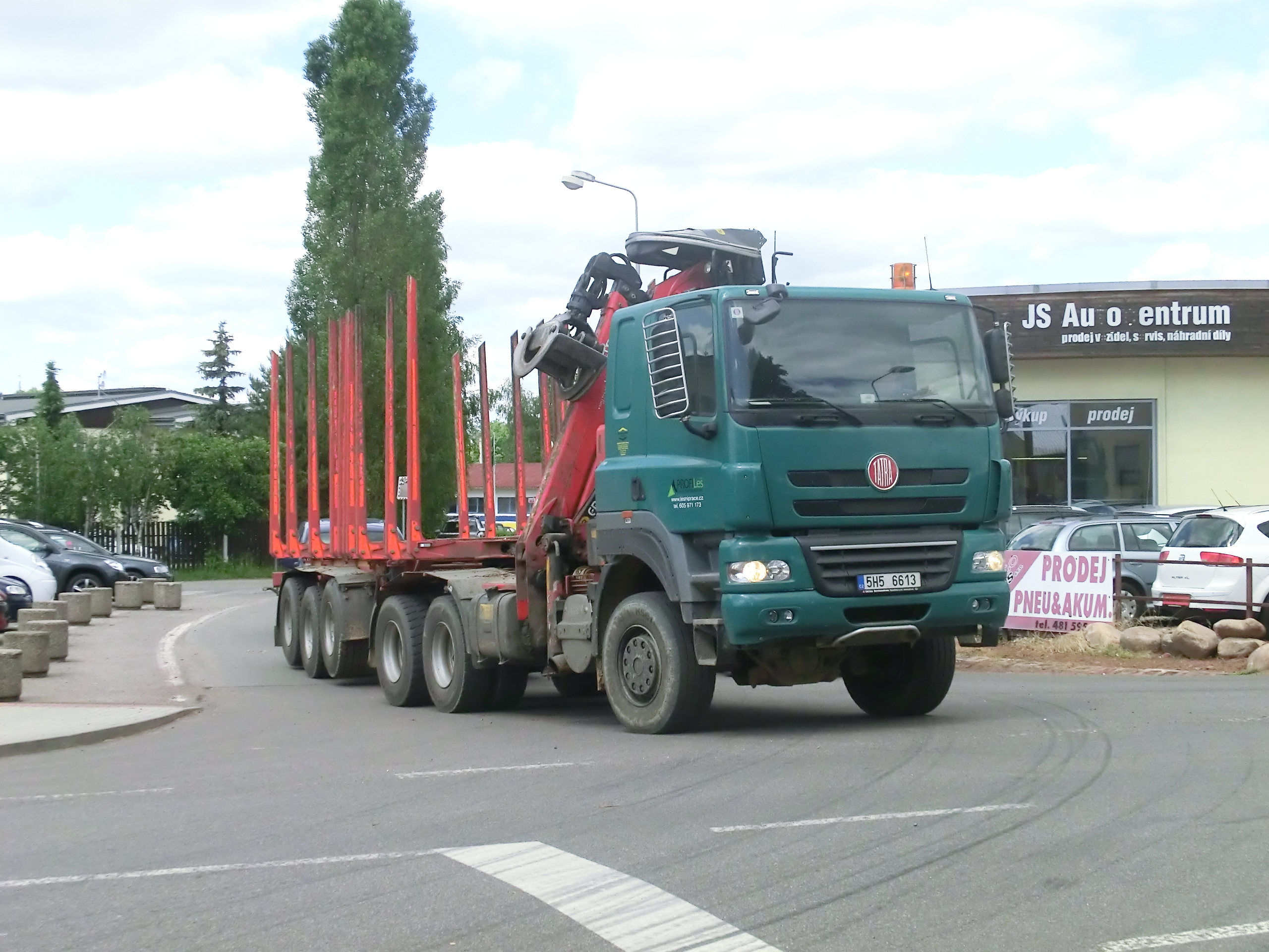 Tatra 158 Phoenix s klanicovou nástavbou pro svoz dřeva vyjíždí v Horkách u Staré Paky na silnici II/293.